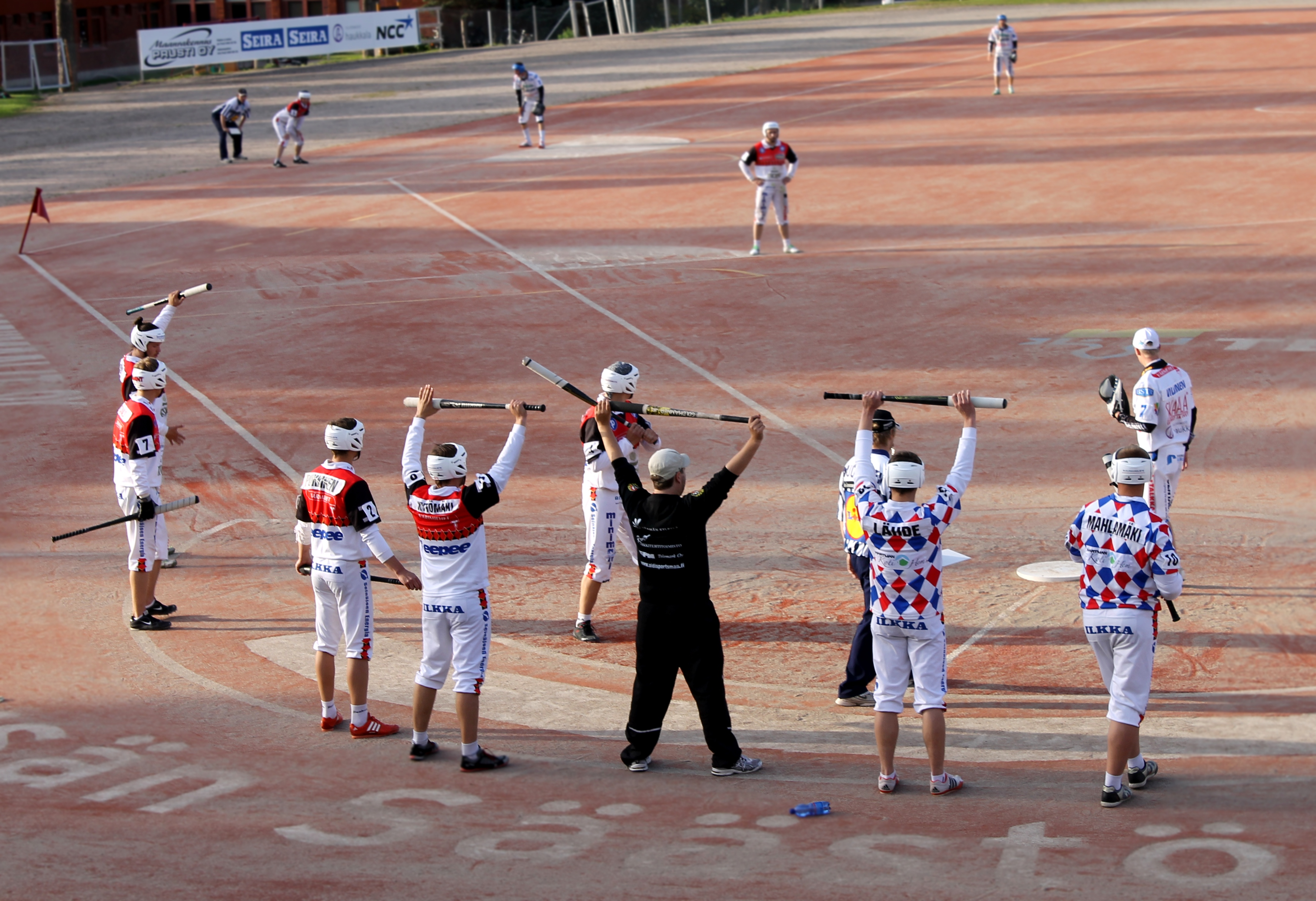 Maila-Jussien pelaajia Superpesiskarsintaottelussa Nurmoa vastaan 25. elokuuta 2012